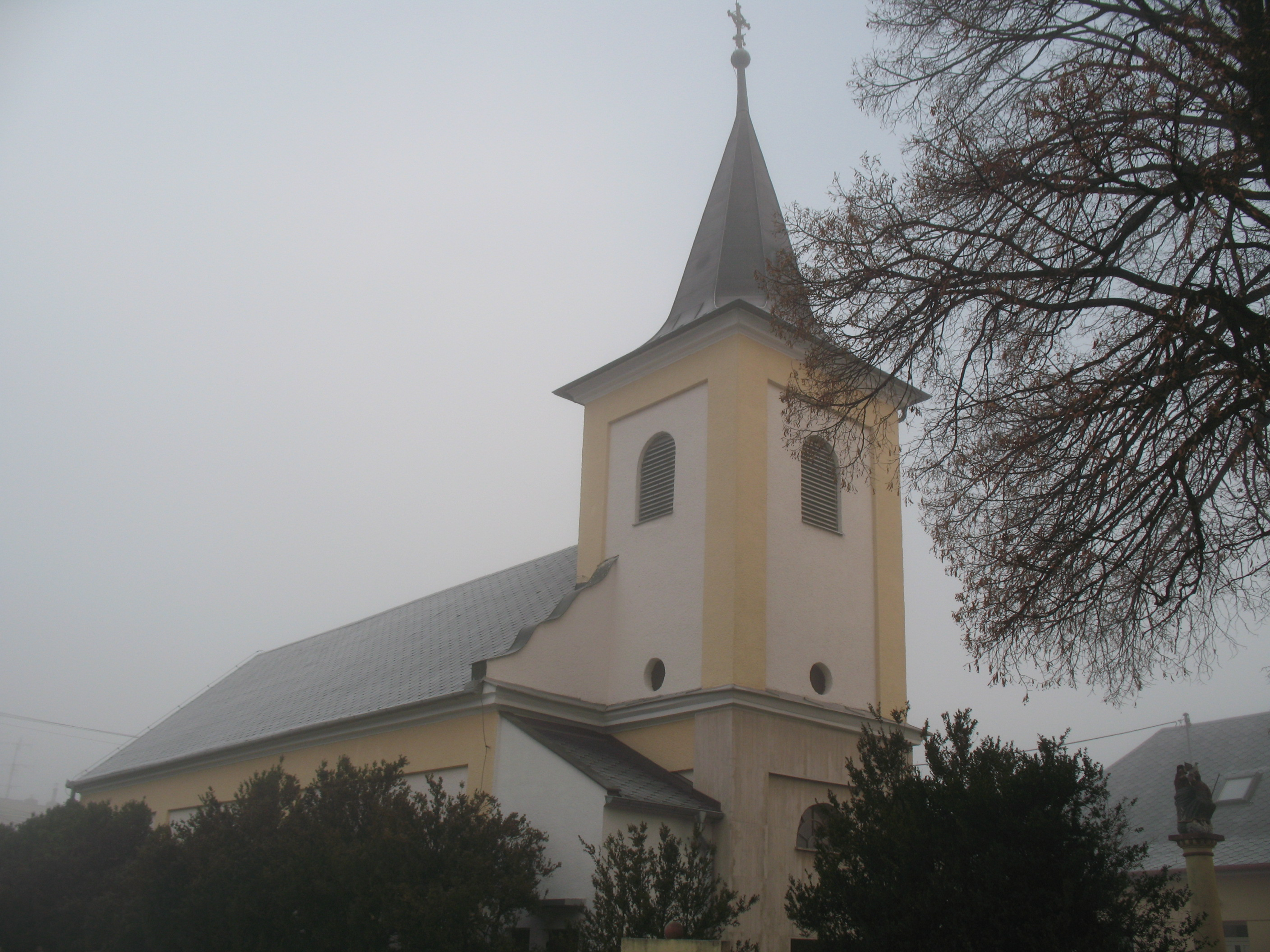 Salgó